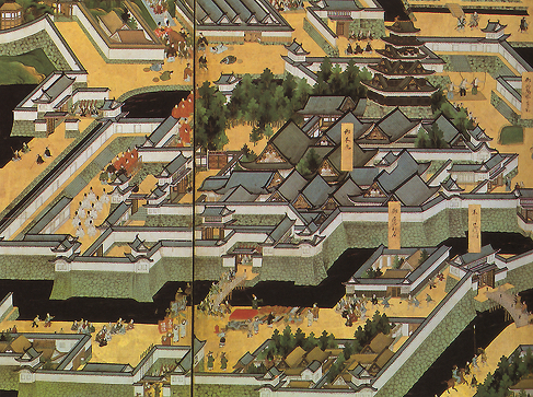 "Калейдоскоп Эдо": ширма с видами Эдо. Работа неизвестного автора. XVII век.